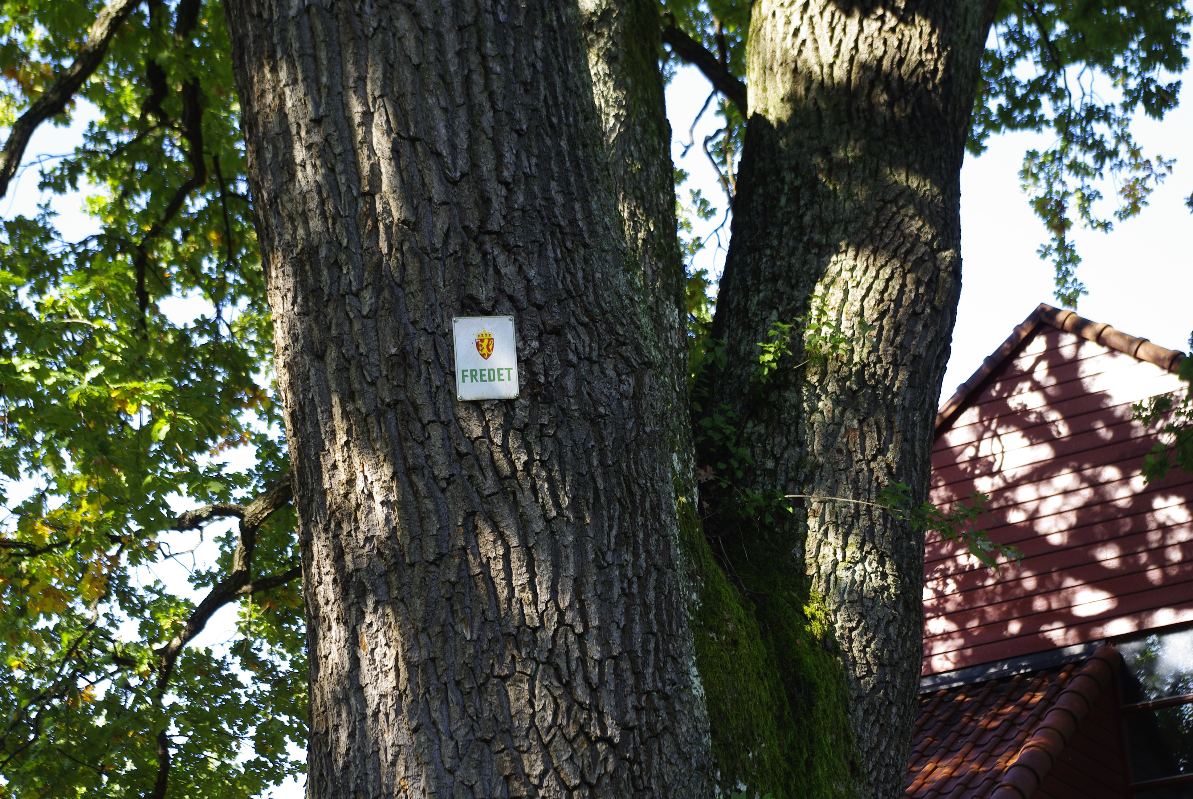 Nærbilde av skiltet